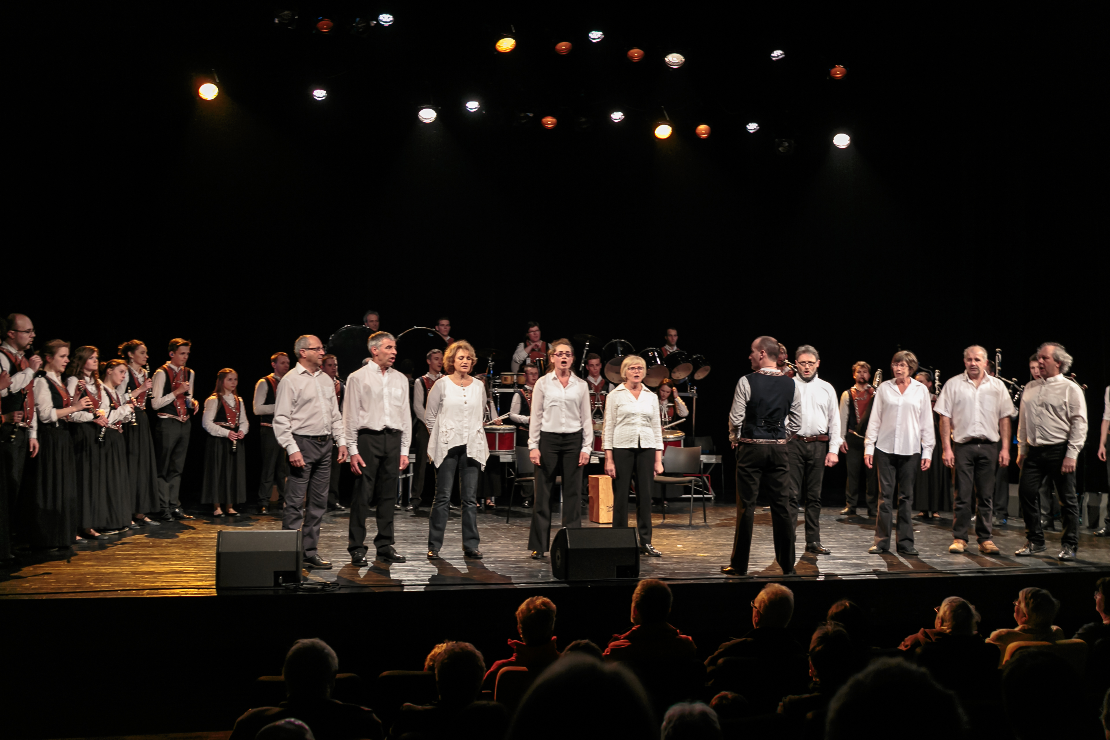 Prestation du Bagad Bro An Aberioù pour les 21 ans du bagad à Plabennec, salle Tanguy Malmanche, le 16 avril 2016.